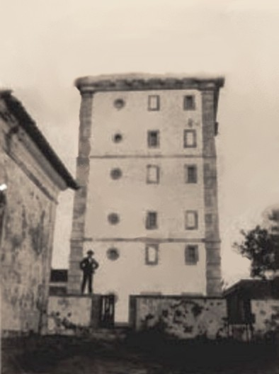 José Oiticica, catedrático e anarquista encarcerado no Presídio da Ilha Rasa por conta de Insurreição Anarquista de 1918 no Rio de Janeiro.